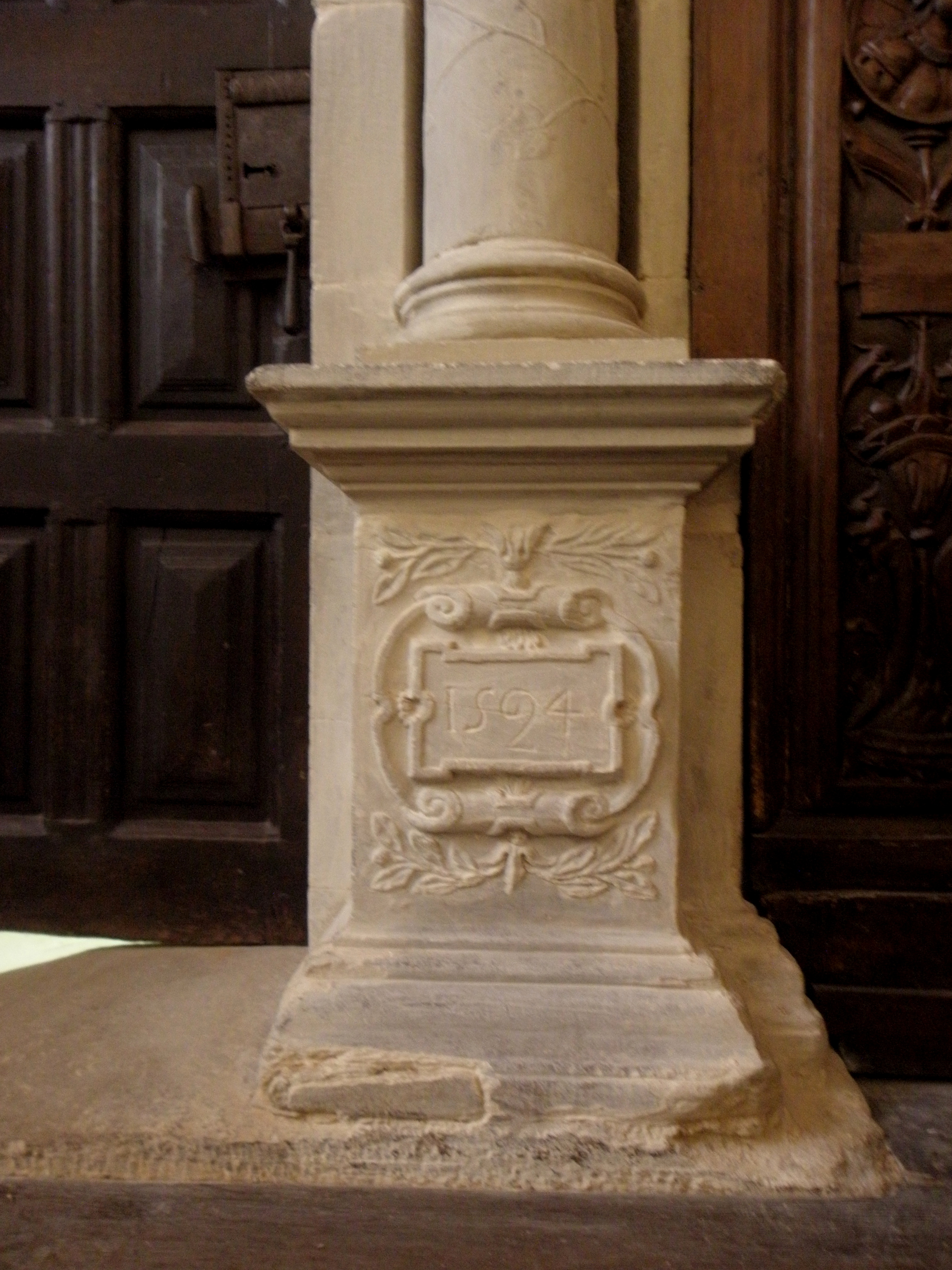 Porte de la sacristie de la collégiale Sainte-Marie-Madeleine de Champeaux (35). Détail.